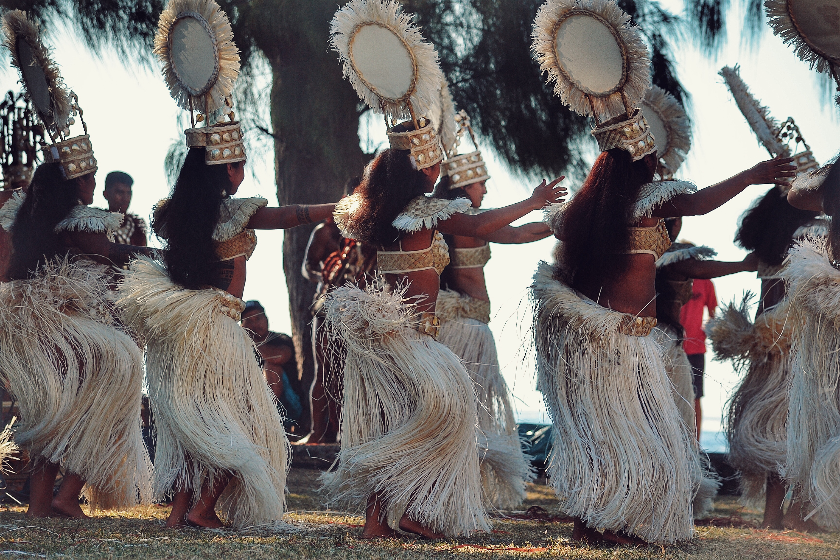 Danse polynésienne